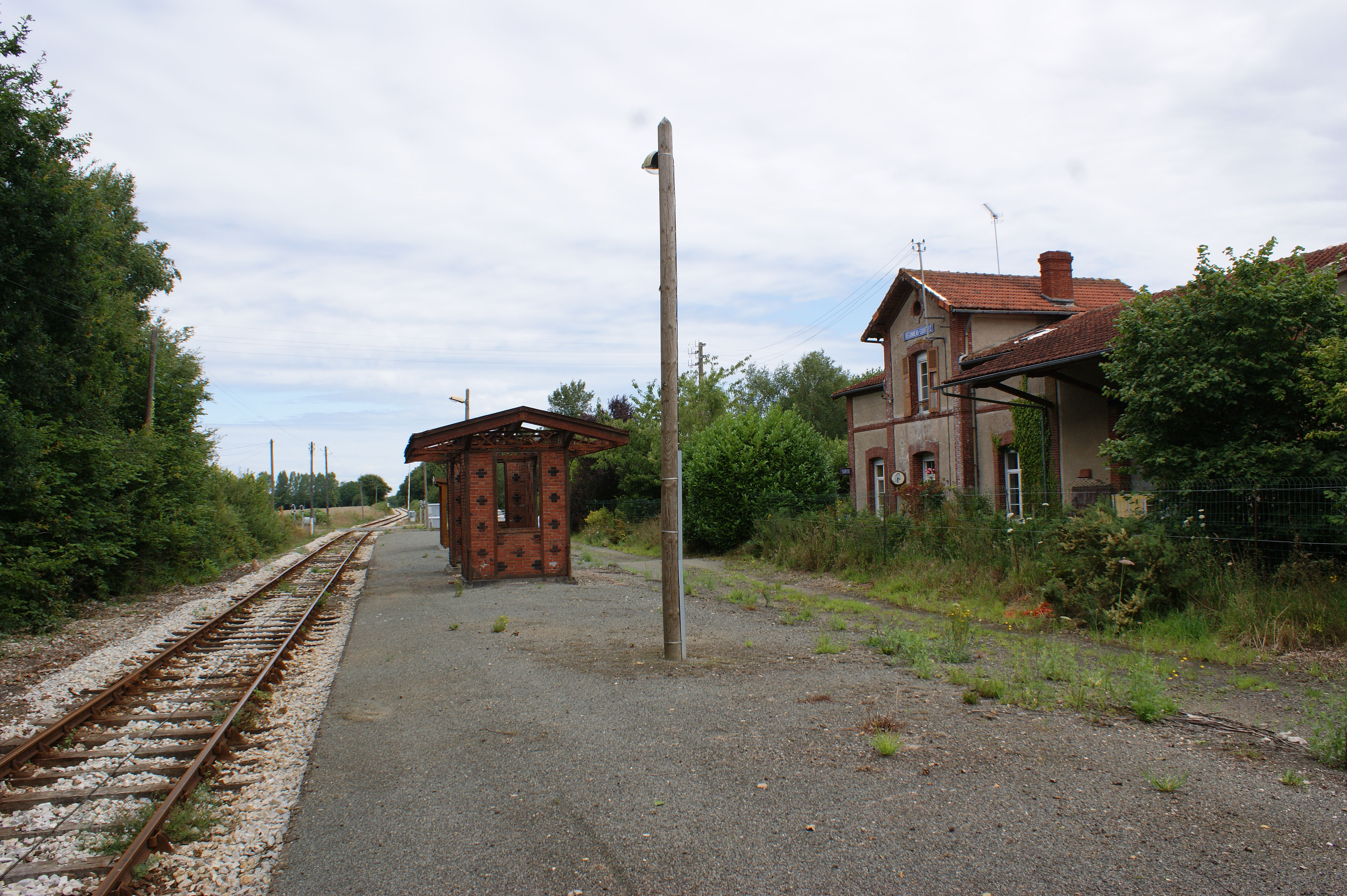 La gare de Trégonneau - Squiffiec devenue halte TER. A gauche l'ancienne voie de croisement devenue la voie TER, au centre l'ancien quai central avec l'abri ruiné du réseau breton et l'abri de la halte TER. En arrière plan à droite, le bâtiment du réseau breton devenue une résidence privée.